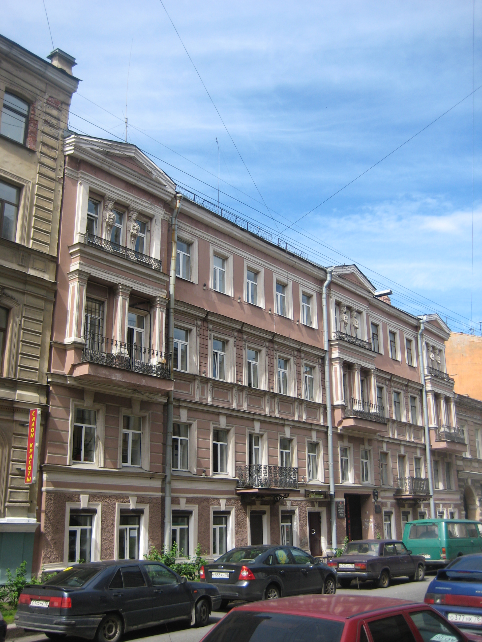 Дом Н. В. Латкина (Моховая, № 11), Санкт-Петербург